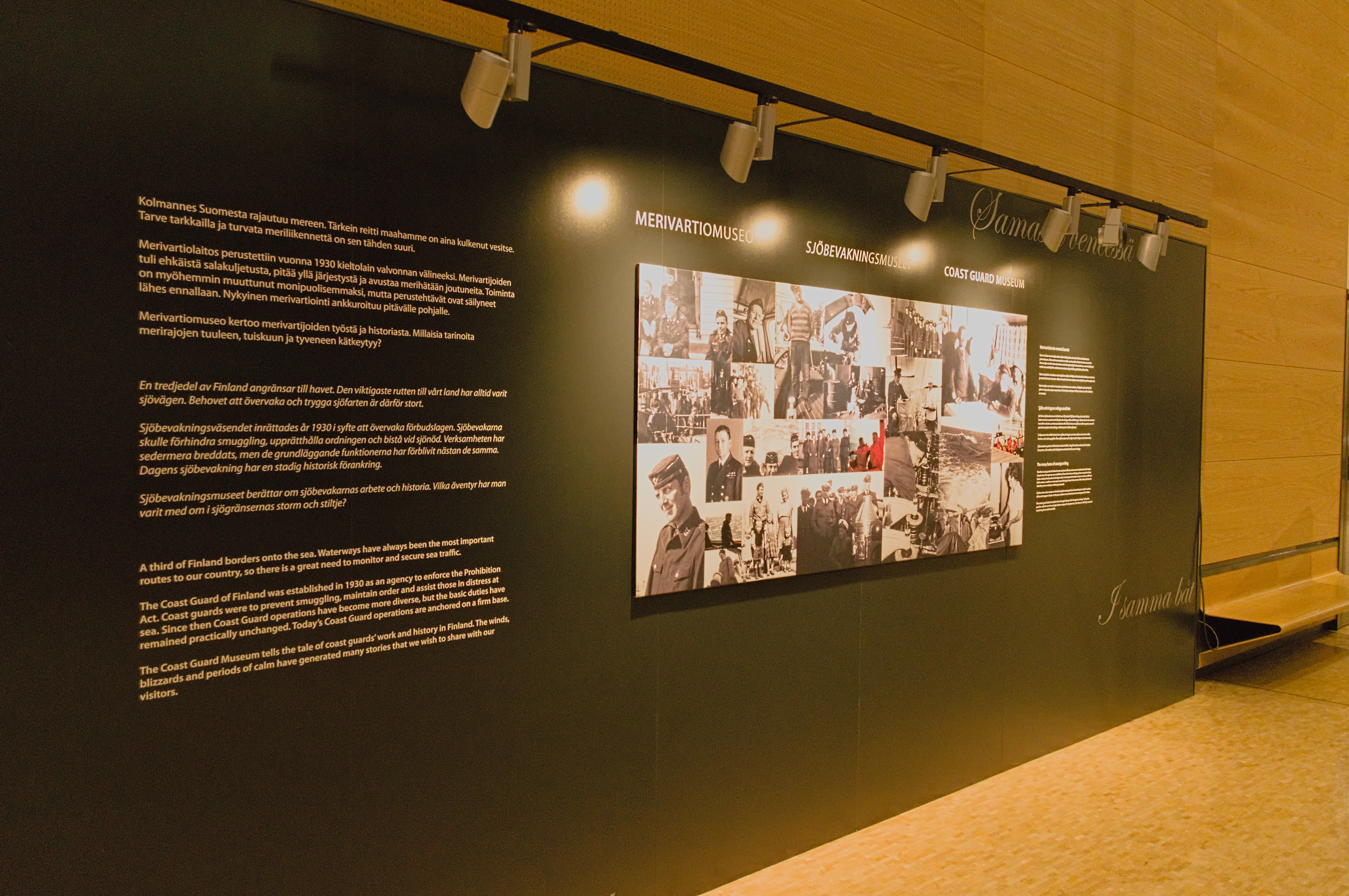 Merivartiomuseon opastetaulu Merikeskus Vellamossa